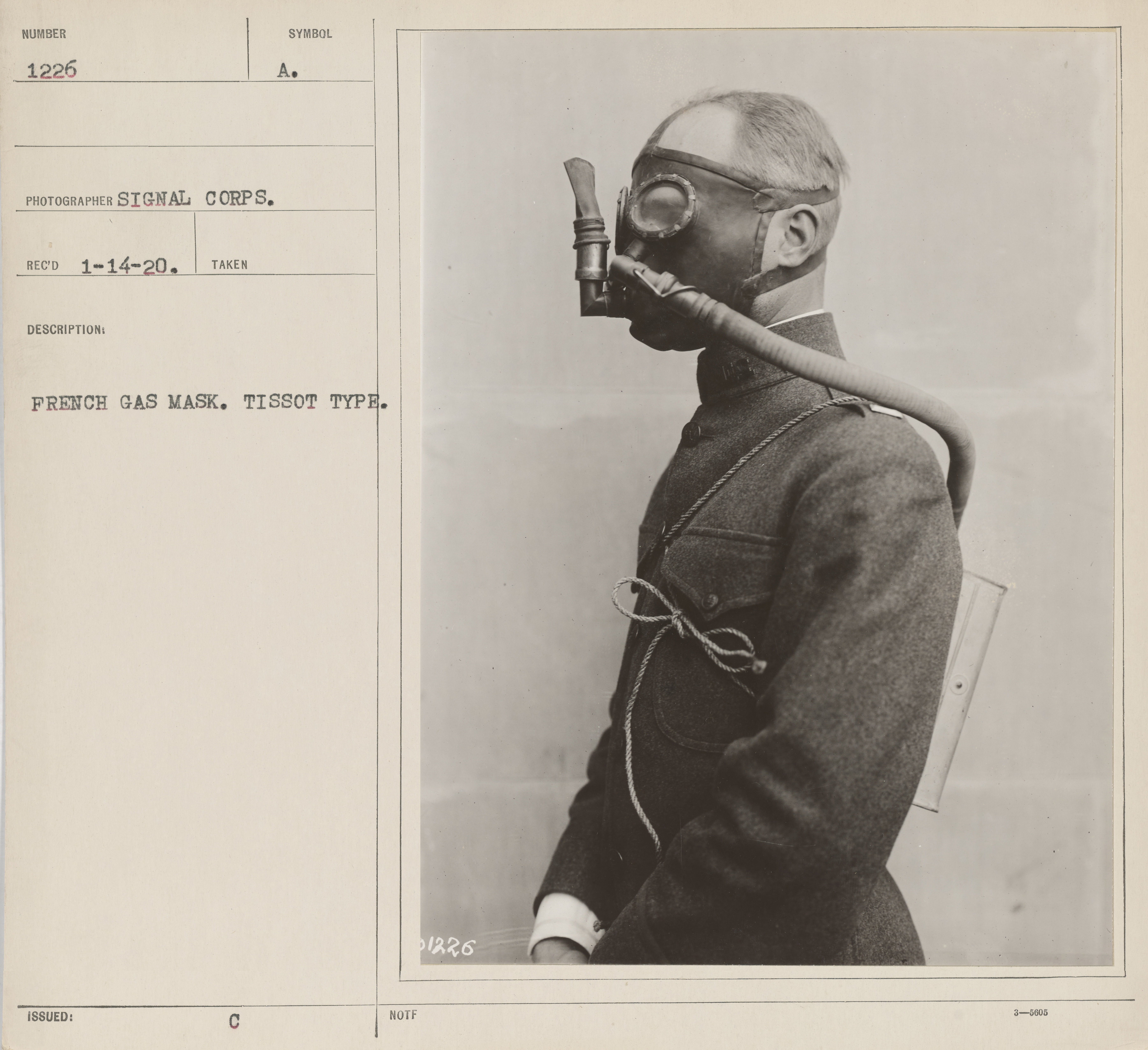 Maschera Anti-Gas - Tissot Mle 1917